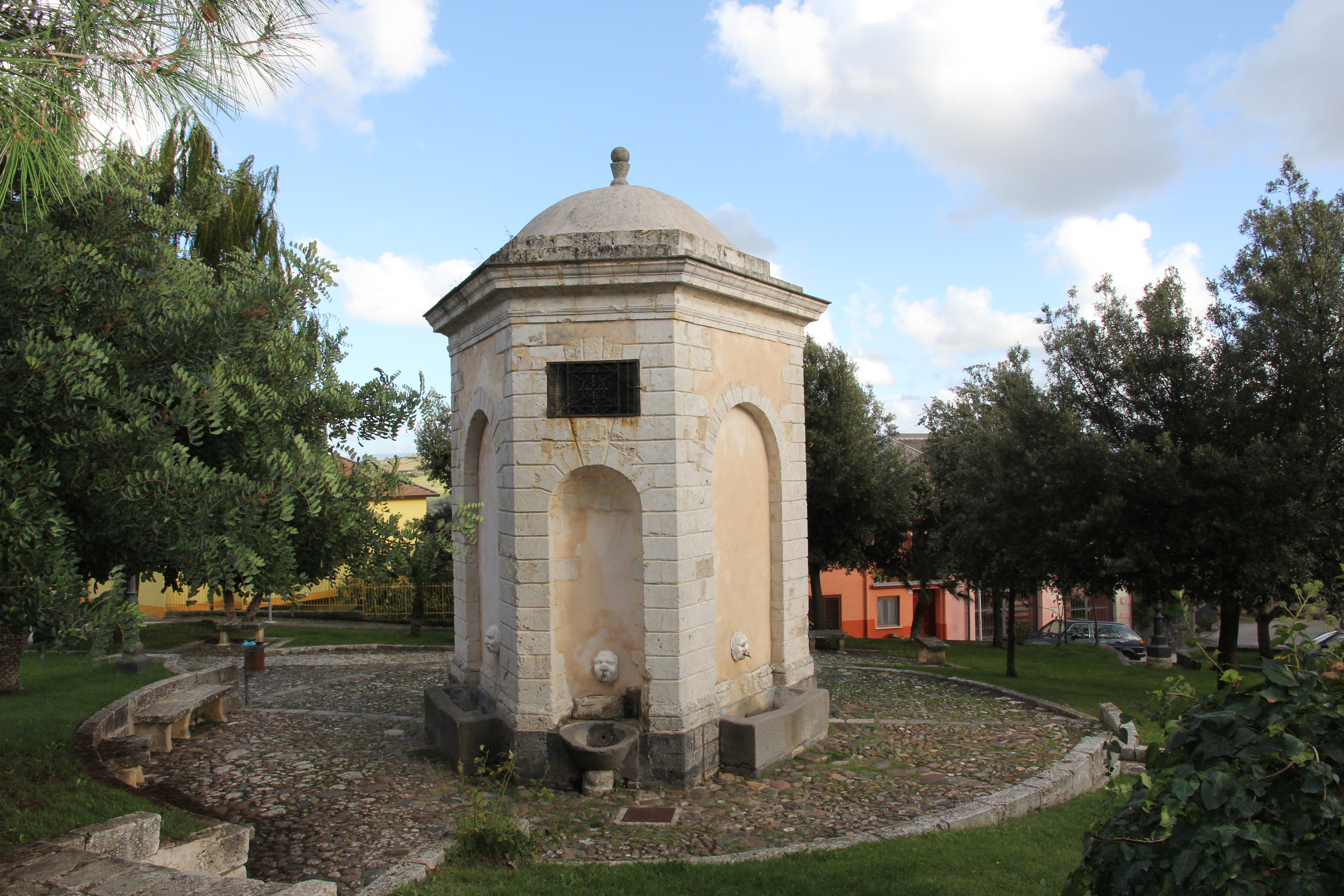 Bonnanaro - Fontata di Cantaru